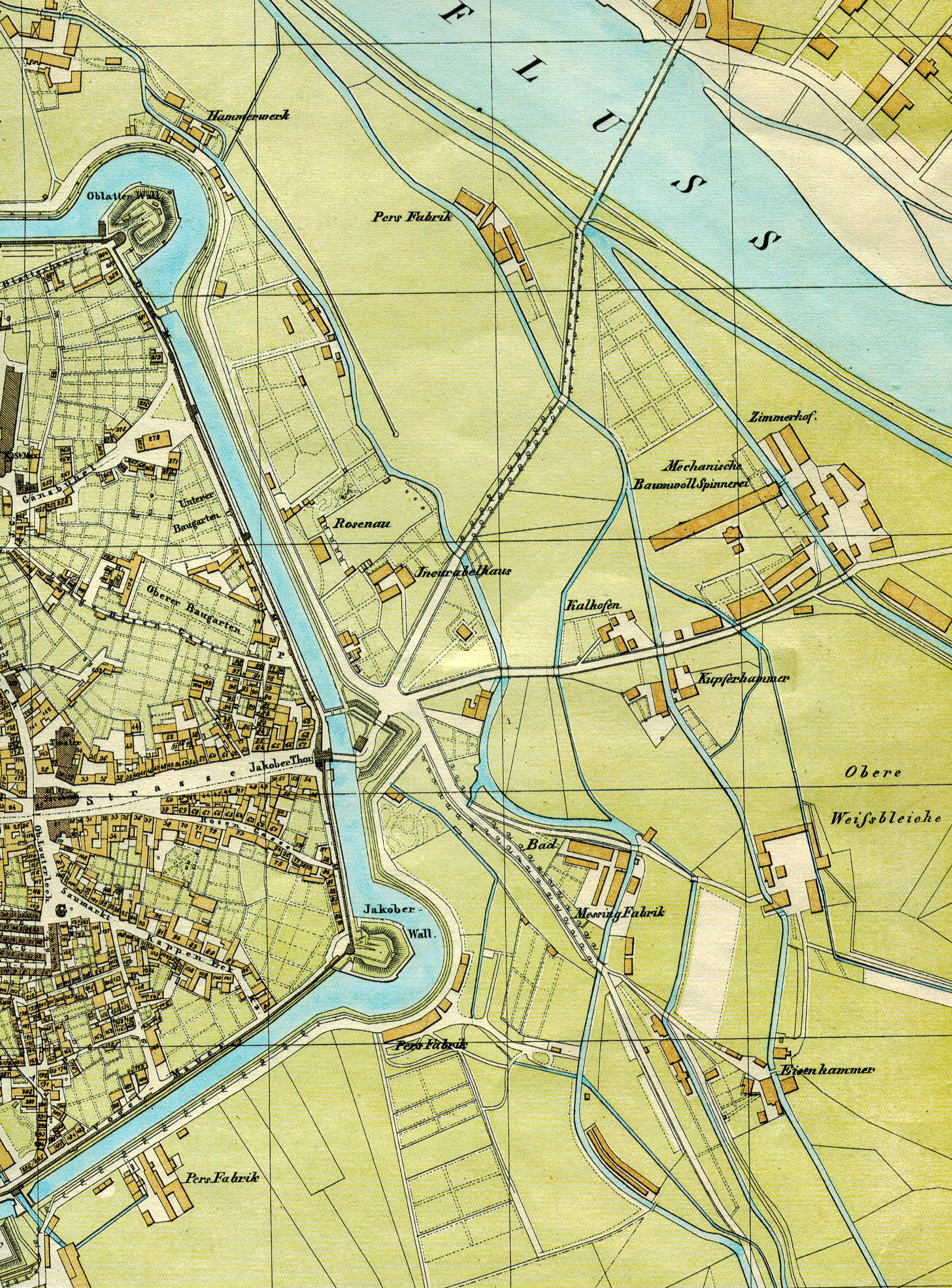 Ausschnitt aus einem Stadtplan von Augsburg aus dem Jahr 1846, der die beginnende Ansiedelung großer Industriebetriebe im Osten vor den Toren der Stadt zeigt. Das Gebiet entwickelte sich in den folgenden Jahrzehnten zum "Textilviertel" mit Tausenden von Arbeitsplätzen in der Textilindustrie. Links ist die Jakobervorstadt. Auch gut zu erkennen sind die Wasserkanäle, die für diese Fabriken bedeutend waren. Im Norden der Lech.